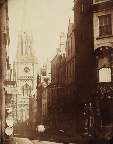 Teitl Cymraeg/Welsh title: Stryd Milson, Caerfaddon Dyddiad/Date: 185- Cyfeiriad/Reference: crj00063 (PG2064/28) Rhif cofnod / Record no.: 3590900 Rhagor o wybodaeth am Ffotograffiaeth Gynnar Abertawe yn Llyfrgell Genedlaethol Cymru More information about Early Swansea Photography at the National Library of Wales